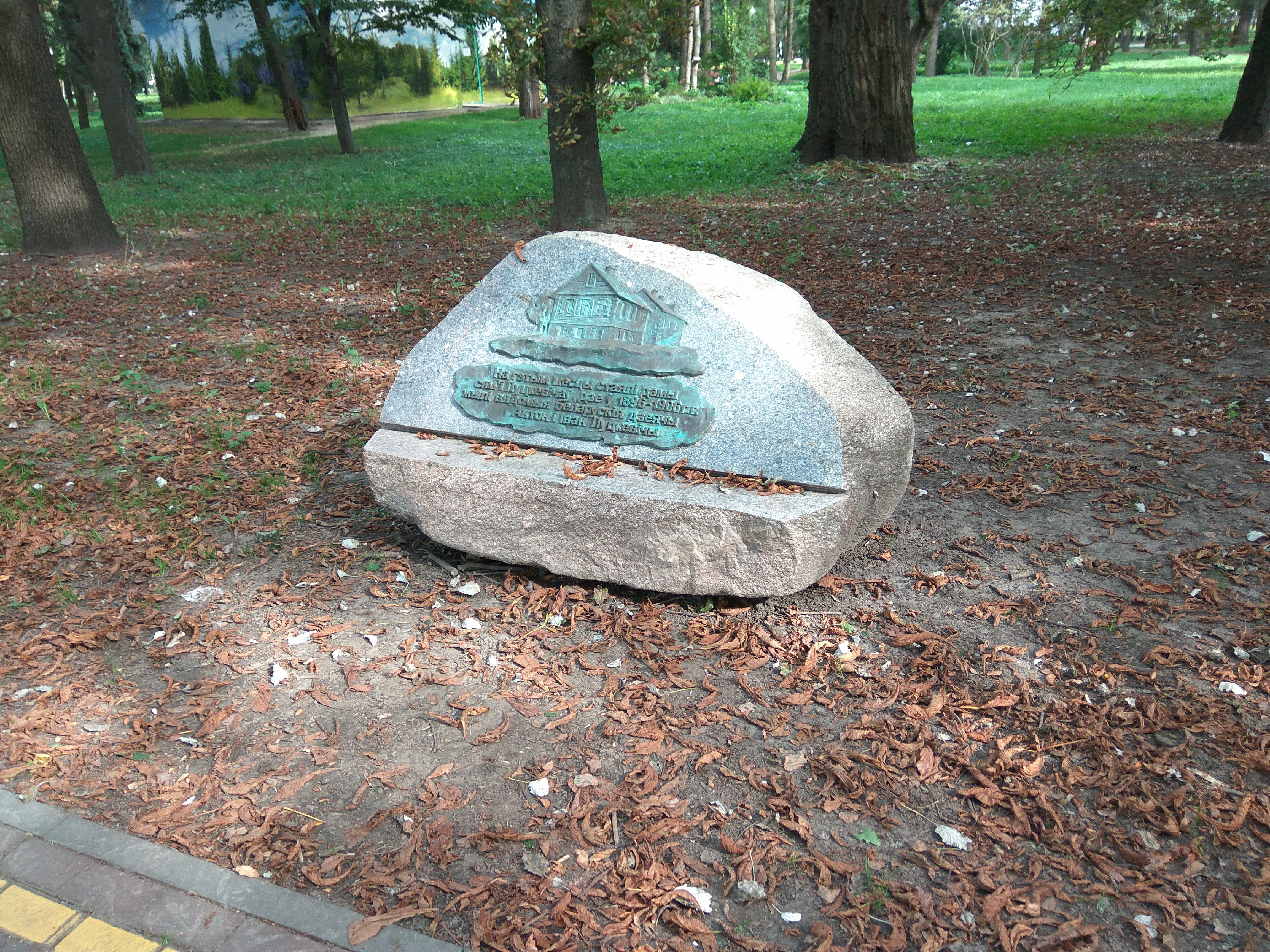 Мінск. Памятны знак у гонар братоў Луцкевічаў